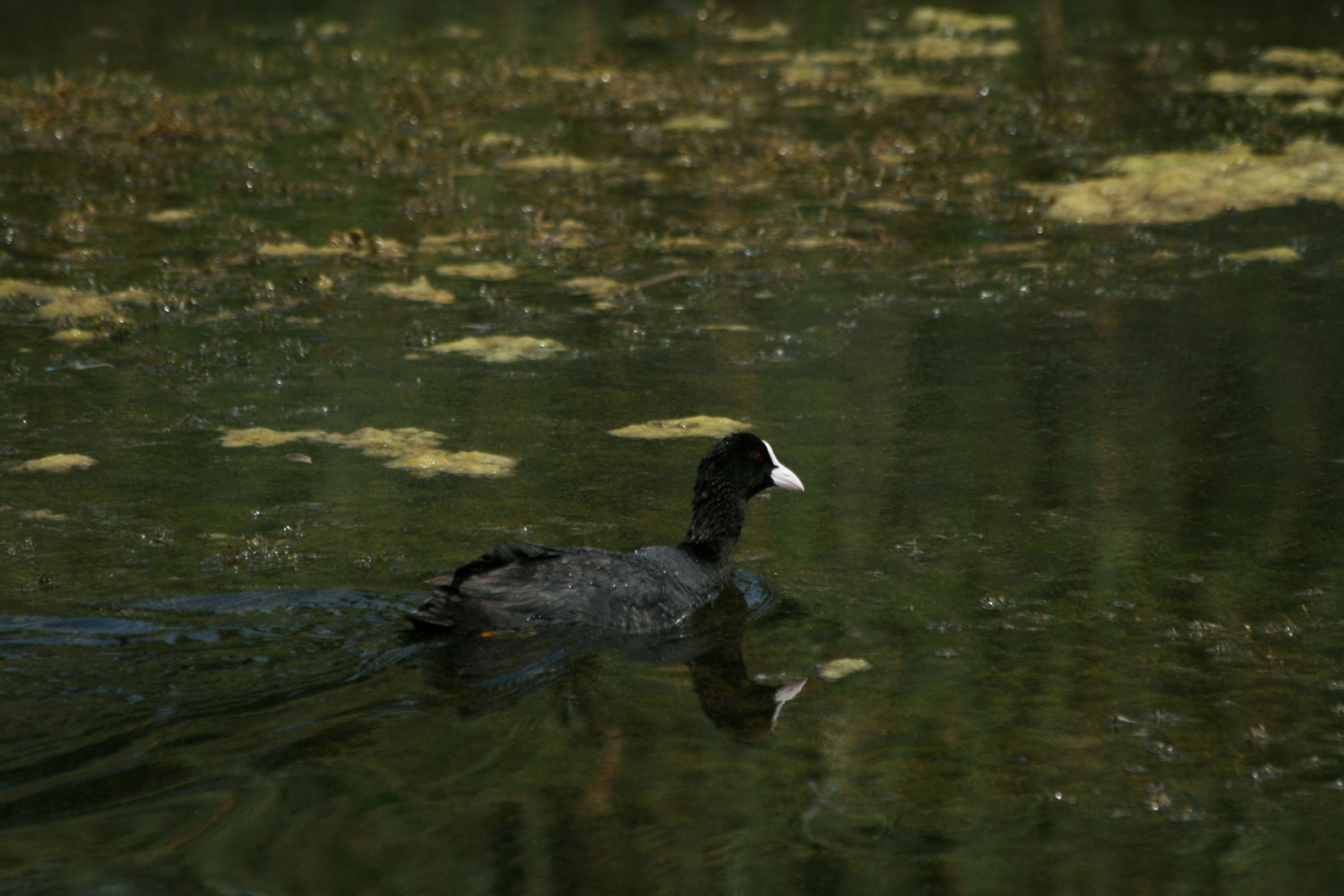 Oiseau dans la rivière Zasavica